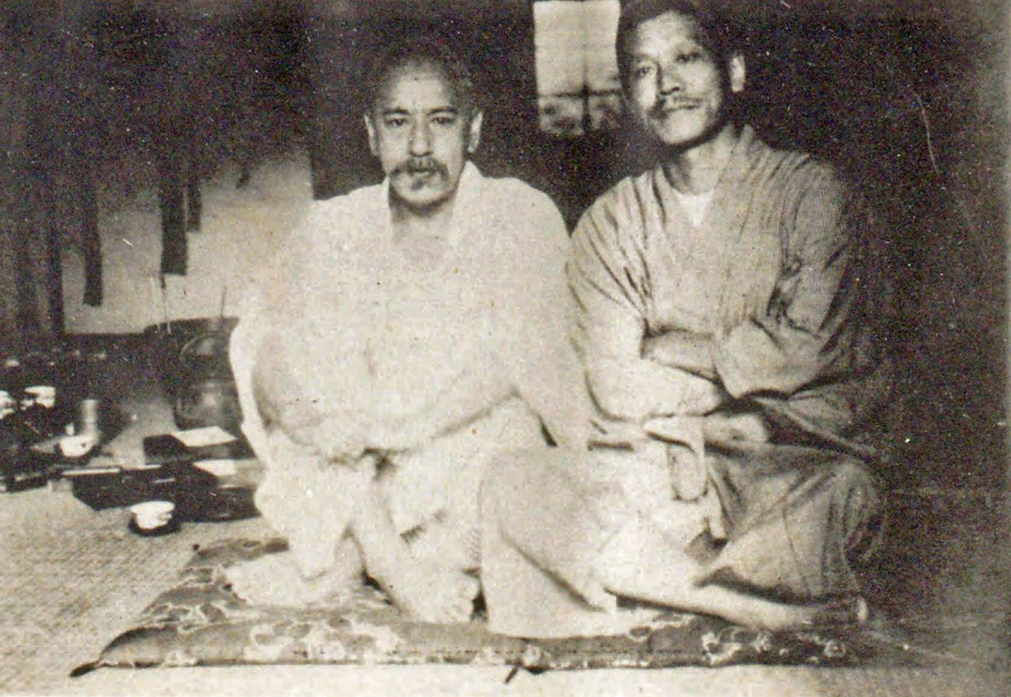 南方熊楠と小畔四郎。（大正4年撮影）